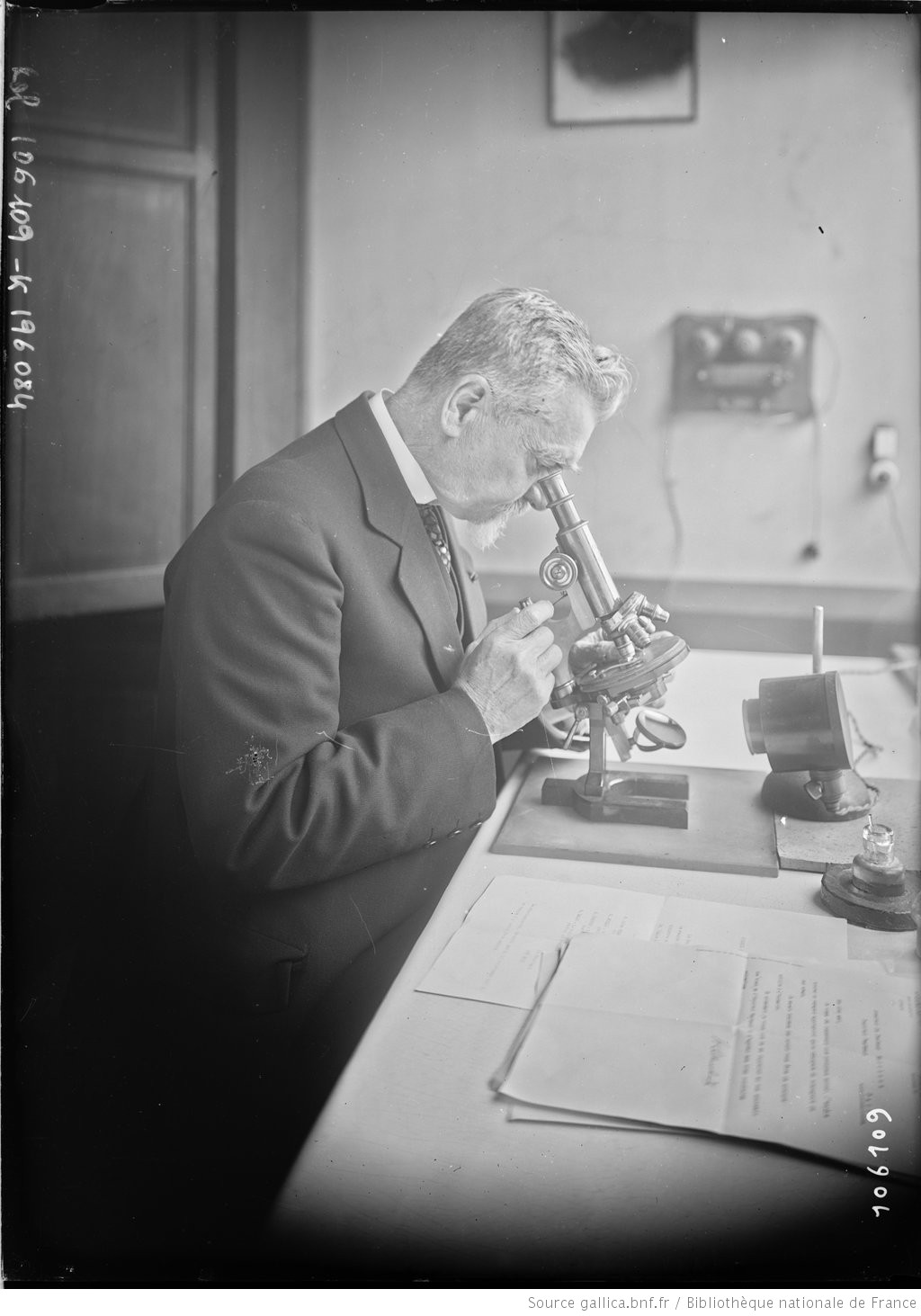 portrait de Marchoux, Émile (1862-1943) Agence Rol